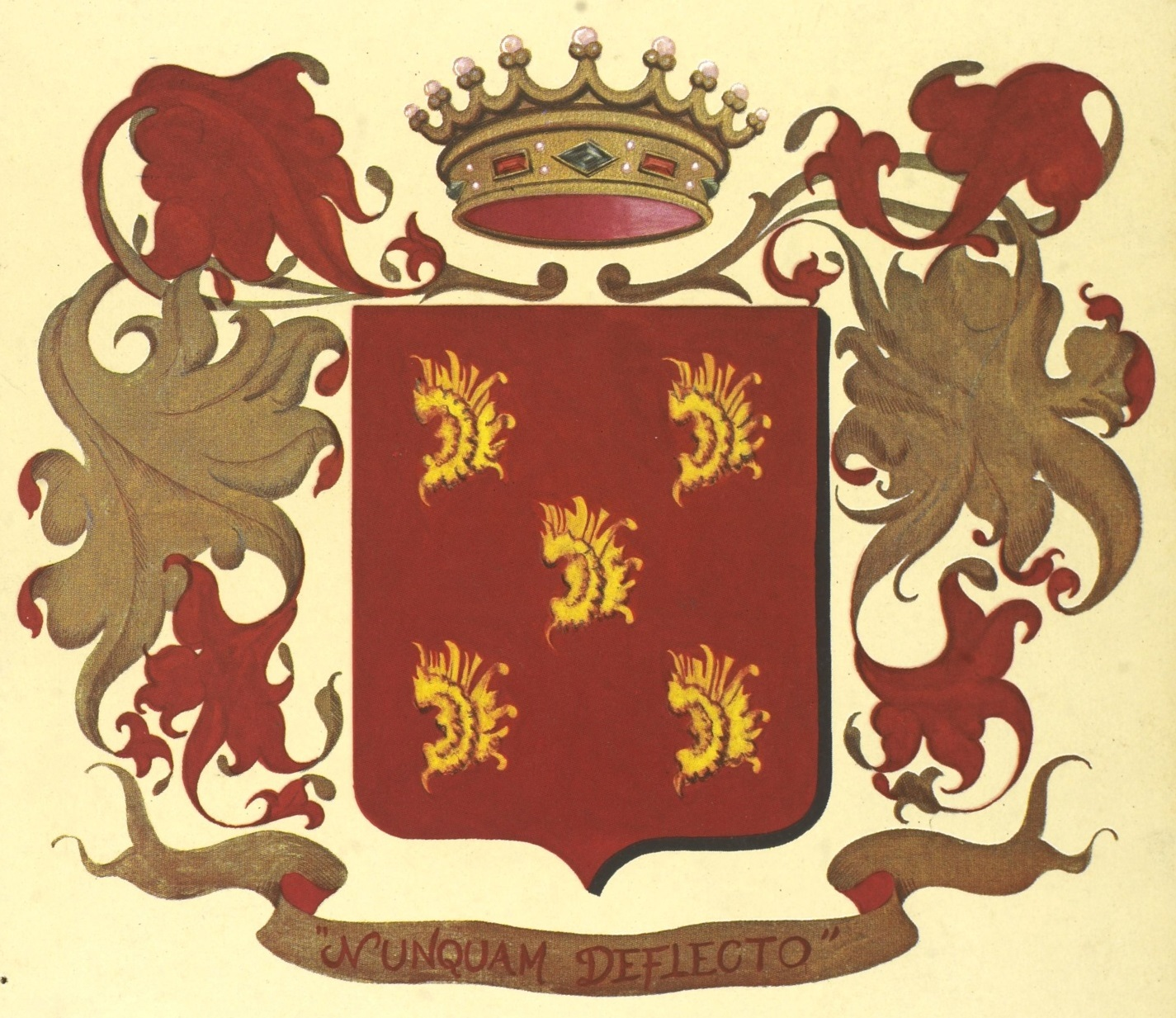 Brasão de Francisco Ferreira de Abreu, Barão de Teresópolis (RJ). Fundo: Brasões.